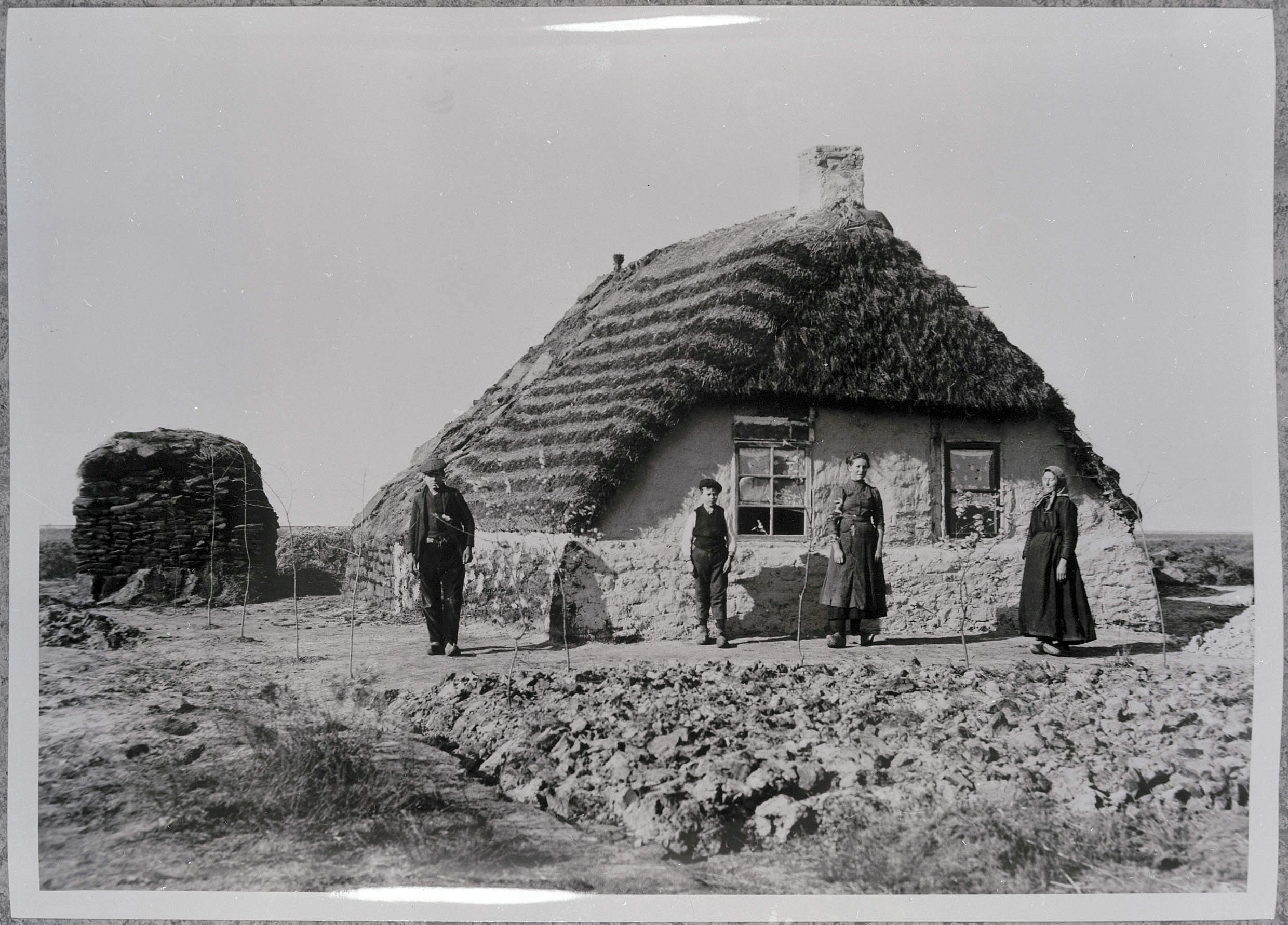 Plaggenhut, bewoner S. (Stoffer) Slomp: Overzicht van de plaggenhut van Stoffer Slomp met de bewoners op de voorgrond en met links een stapel plaggen (opmerking: Klaas Uilkema onderzocht deze boerderij in oktober 1920) This is a possible Rijksmonument: Find the monument in the Monuments database: Wijsterseweg in Ruinen All Rijksmonumenten in Ruinen Is this a Rijksmonument? Yes No More information about this project and help. More images to work at in Category:Possible Rijksmonumenten.